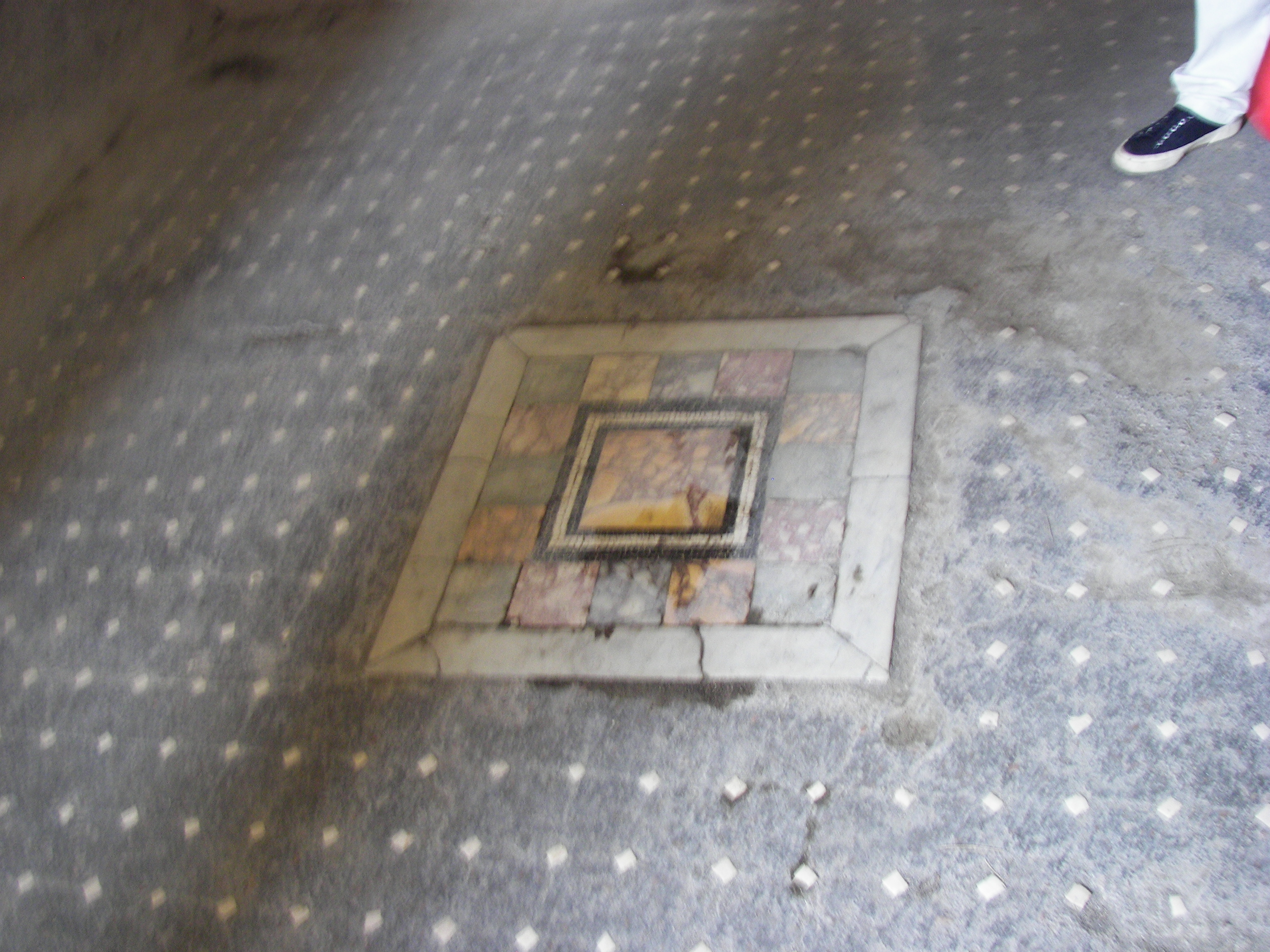 "Pinax" in marmi colorati al centro di un pavimento in mosaico nella Casa dei Cei in Pompeii.